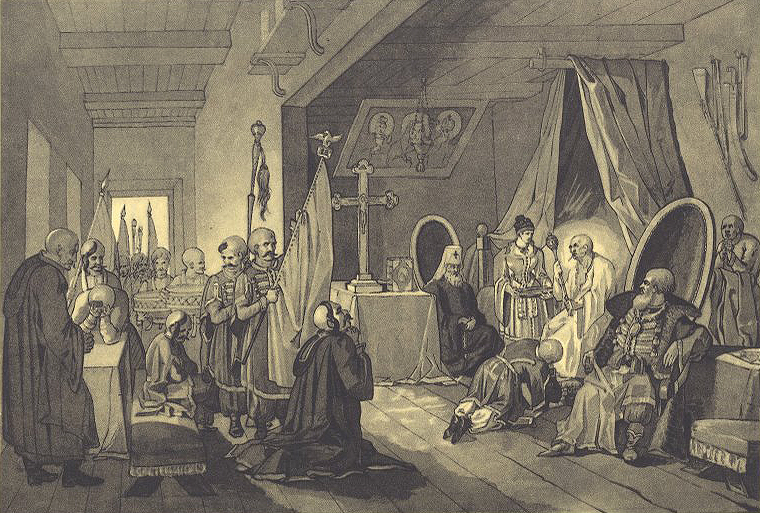 Смерть Богдана Хмельницького. Папір, туш, пензель, перо (30,8 × 45,1). [Пб.]. [1836 — 1837].